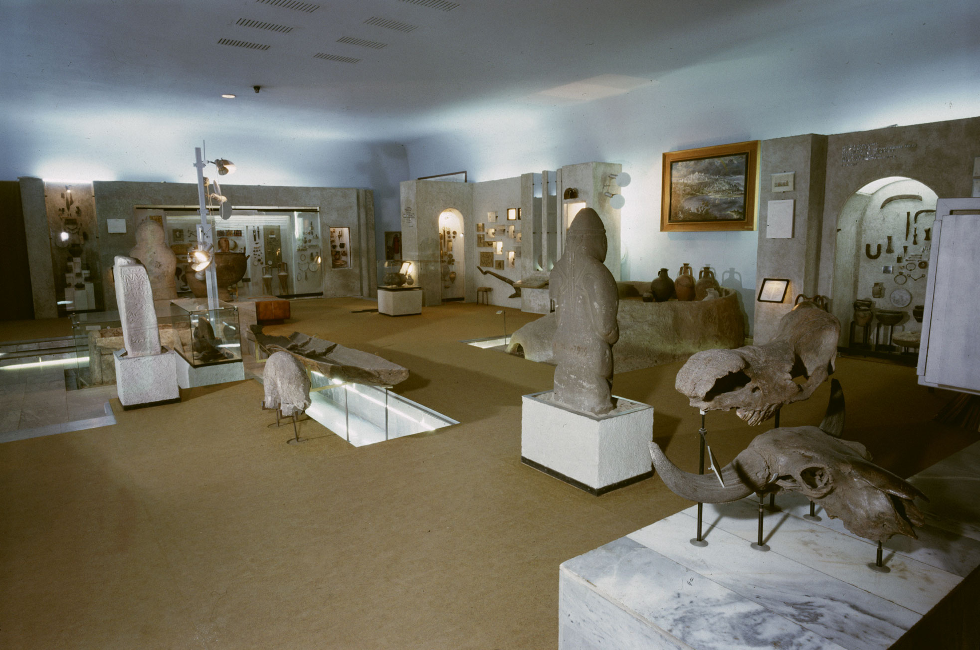 Зала №1. Археологія